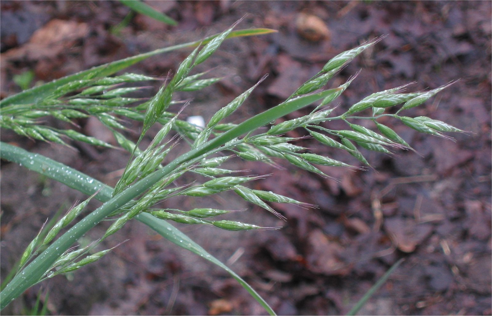 Bromus mollis (Zachte dravik bloeiwijze)